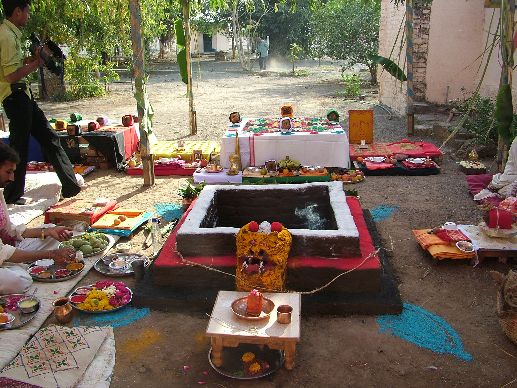 Laghu Rudrayag Yagna at Shri Nathjidada Ni Jagya - Danidhar(Taluka Kalavad, Dist. Jamanagar, Gujarat-India)